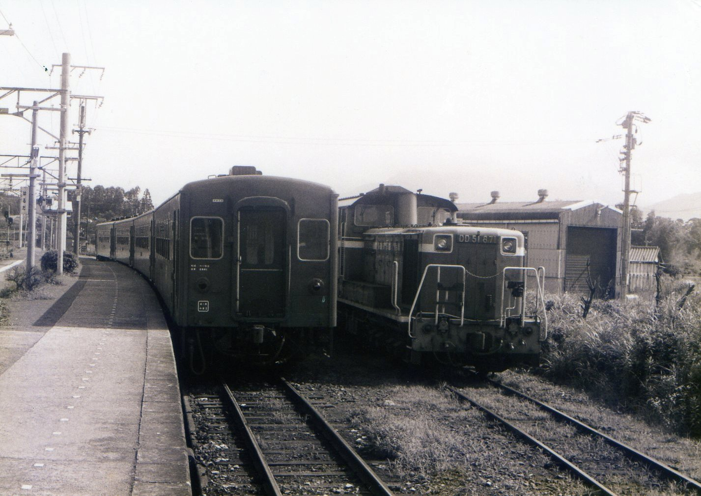 鹿児島本線原田駅構内、1993年